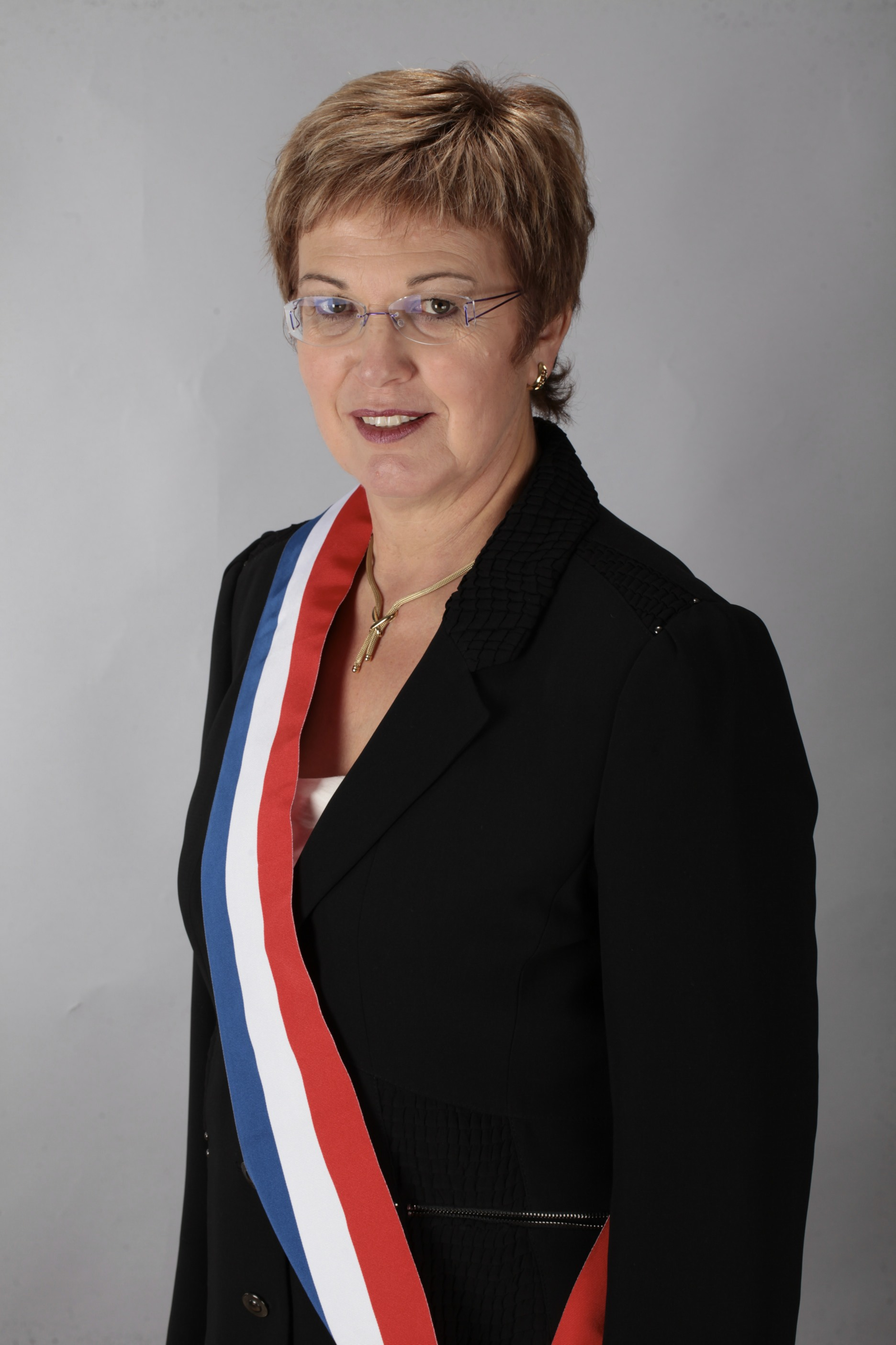 Photographie réalisée en studio à Saint Rpahael 24160, de Colette Langlade, députée de la Dordogne.